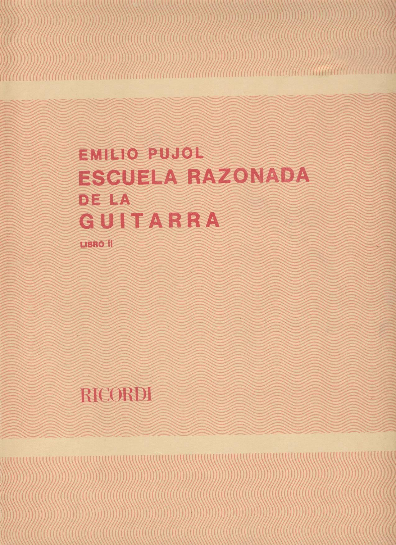 Método de guitarra Emili Pujol